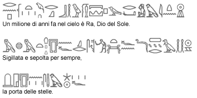 I geroglifici del coperchio di pietra dello Stargate. Immagine realizzata da HILL basandosi sulla versione a caratteri presente su wiki alla voce :en:Stargate.